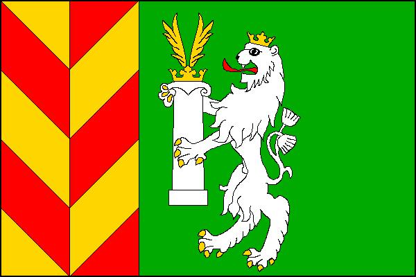 Vlajka obce Velký Valtinov